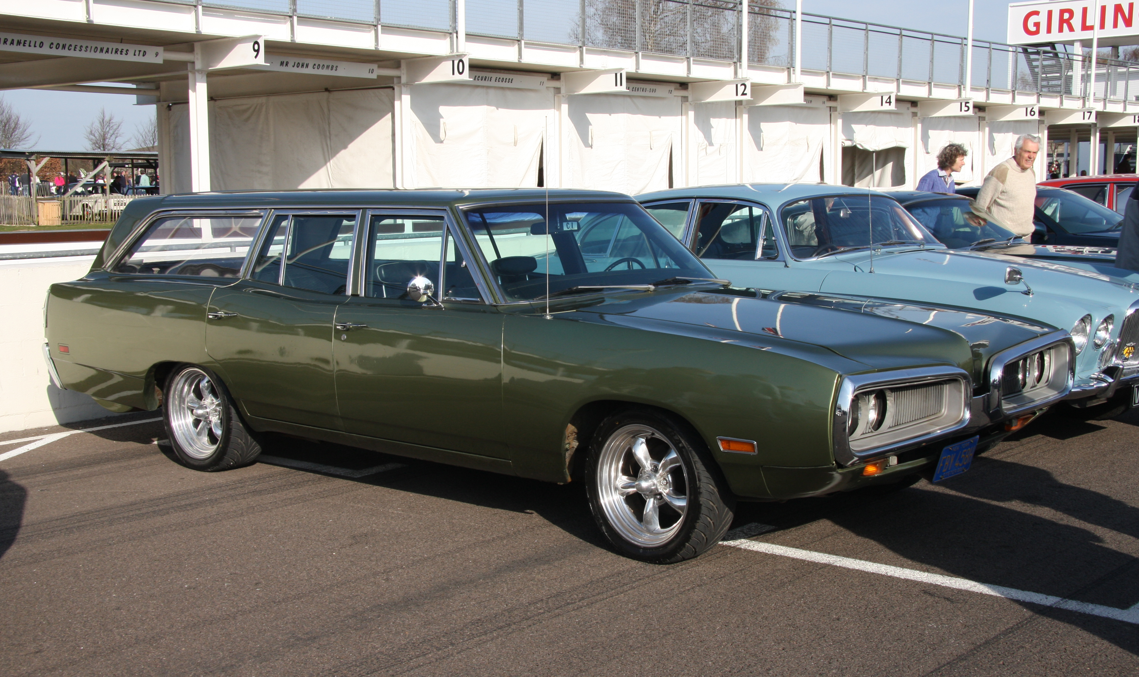 Dodge Coronet Wagon